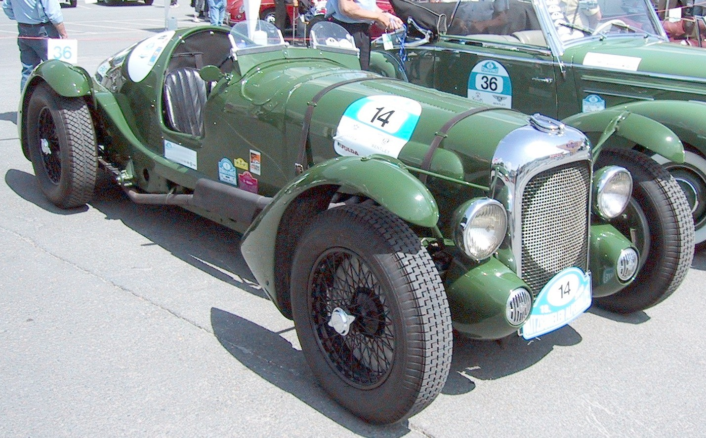 Lagonda V12 Le Mans Built in 1938 4480 ccm